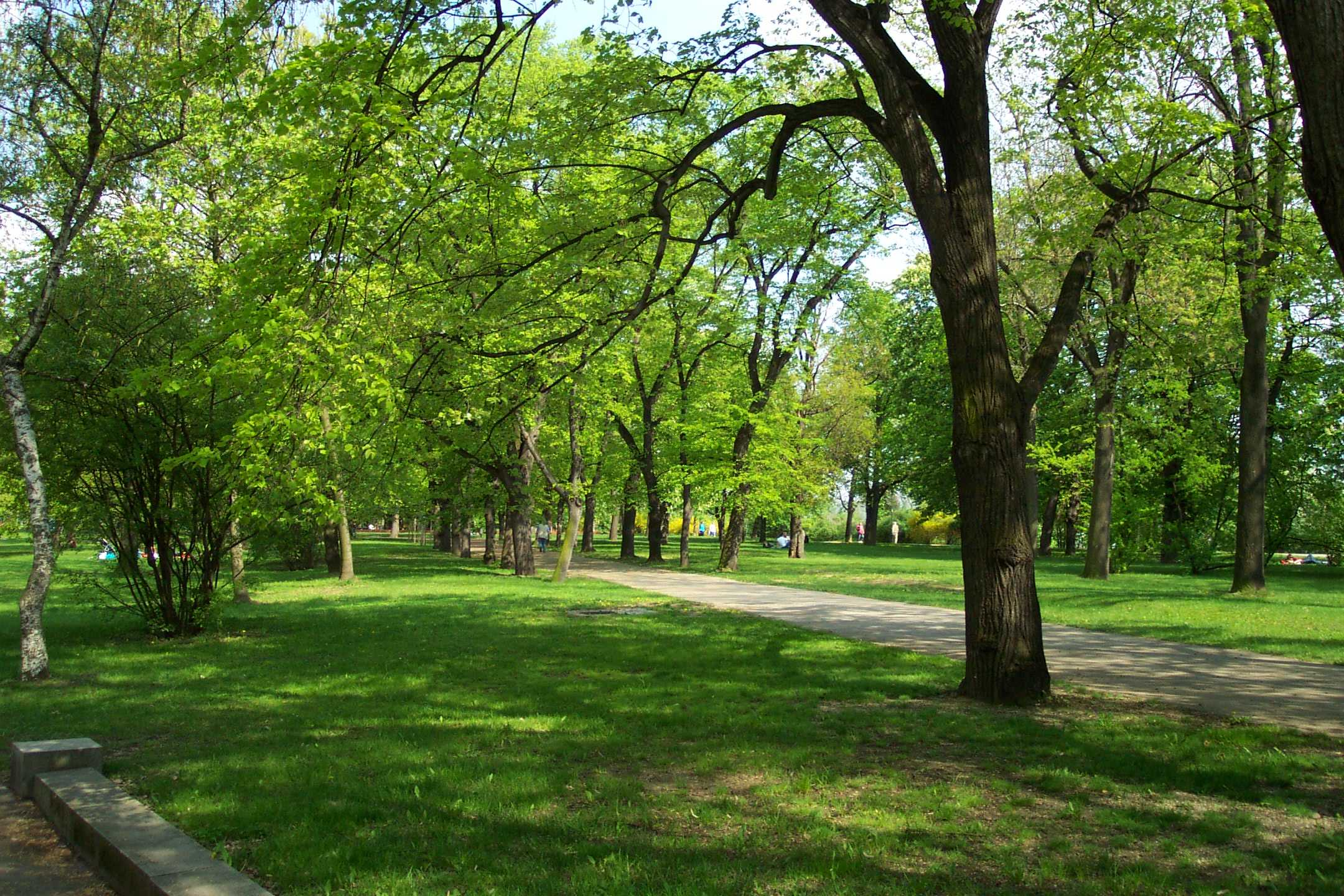 Letná park in Prague - Park Letná v Praze